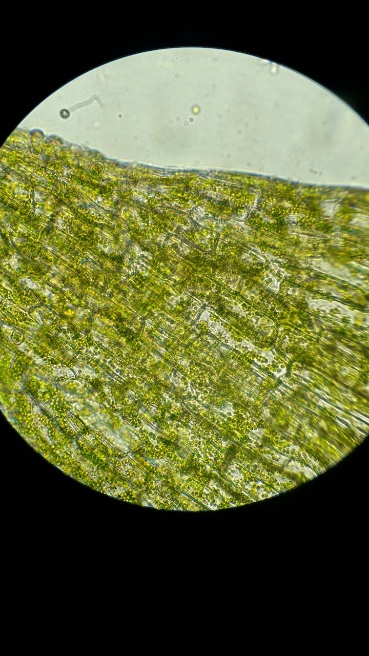 Preparato di elodea visto al microscopio a 400x